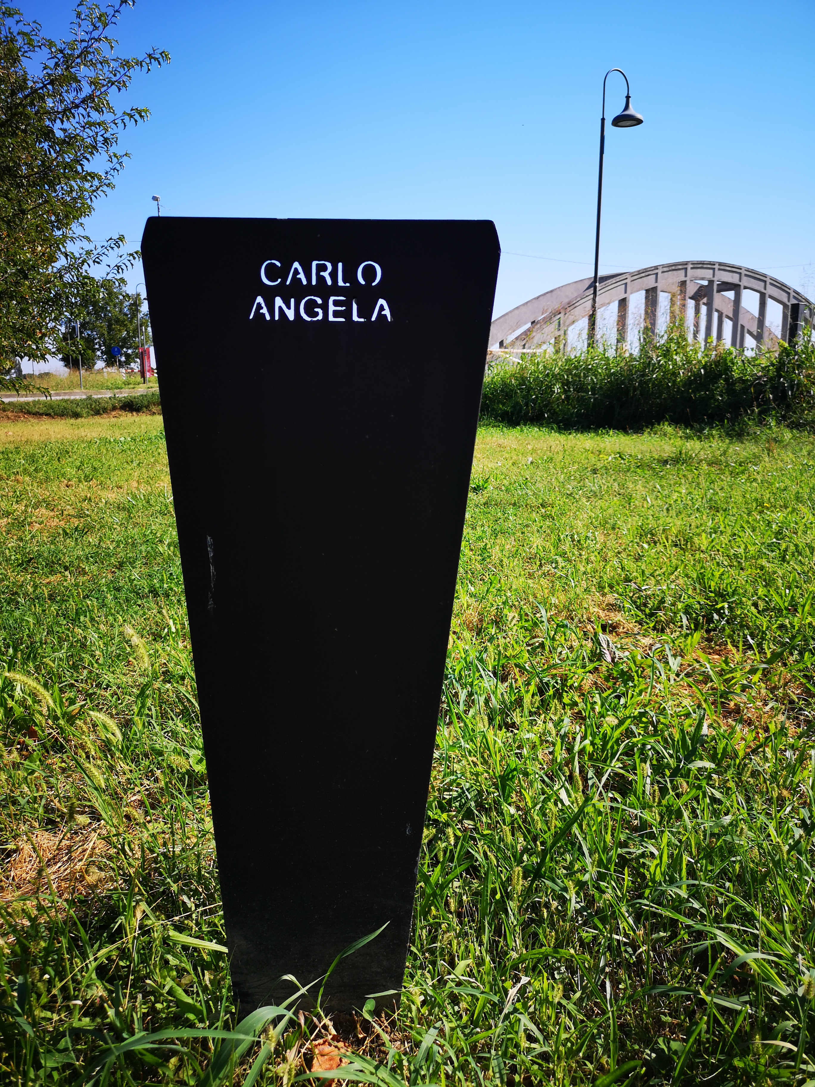 Stele dedicata a Carlo Angelo nel Giardino dei Giusti del Mondo, Padova. Sullo sfondo il ponte di Terranegra.